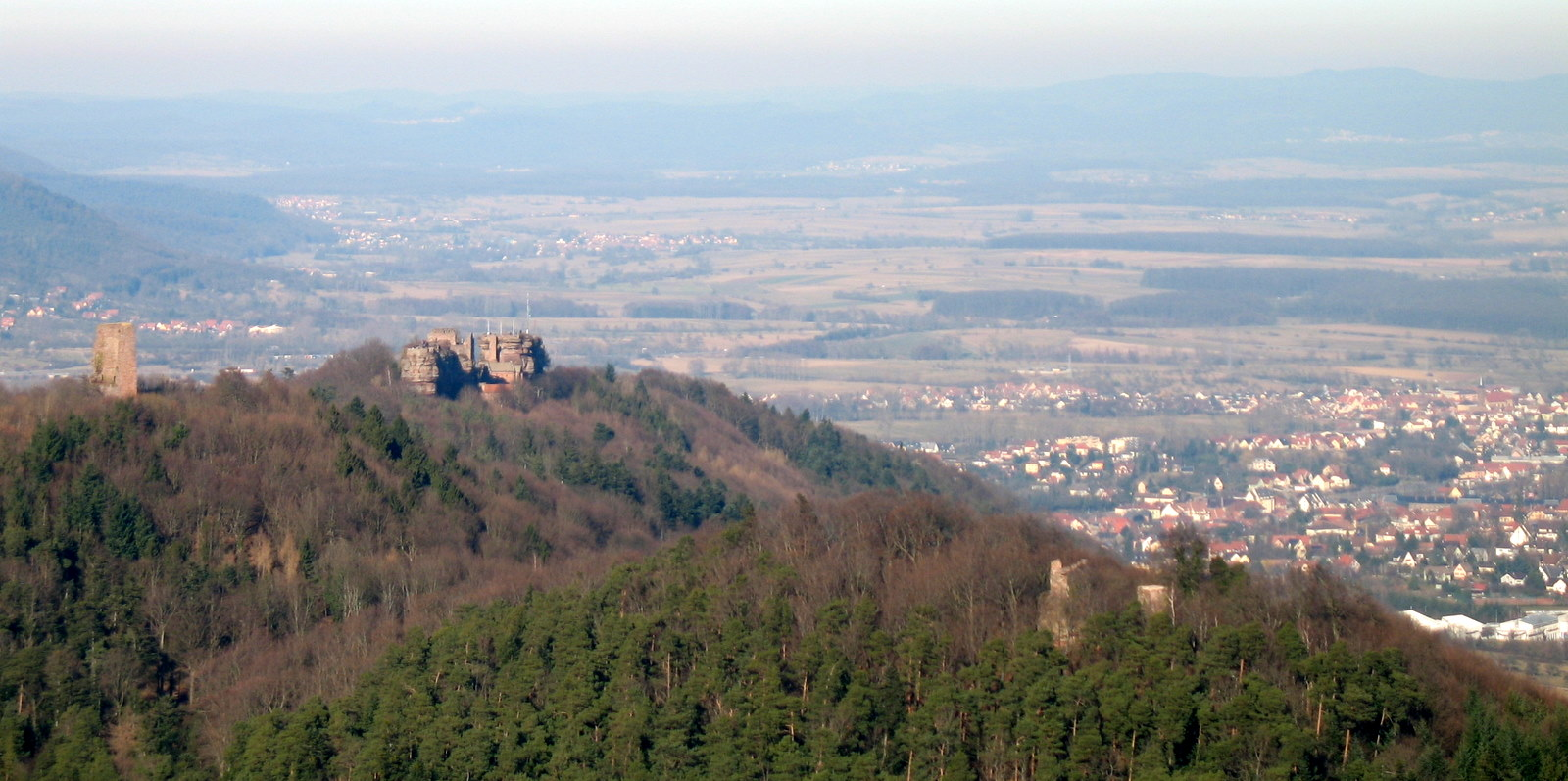 Châteaux de Saverne: Grand-Geroldseck, Haut-Barr, Petit-Geroldseck